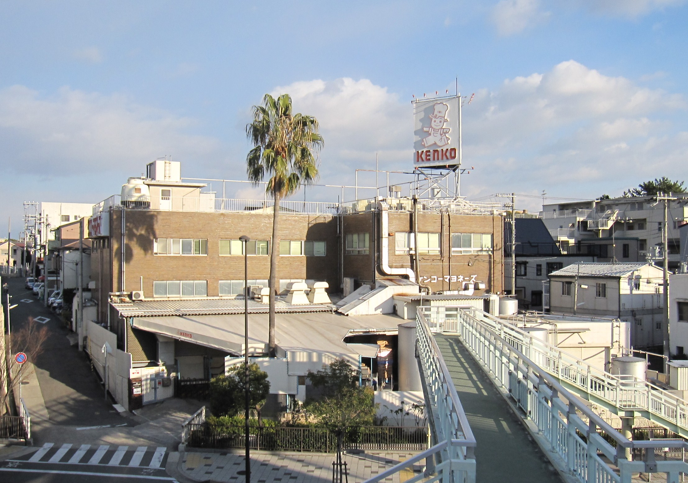 ケンコーマヨネーズ神戸工場（本店所在地）